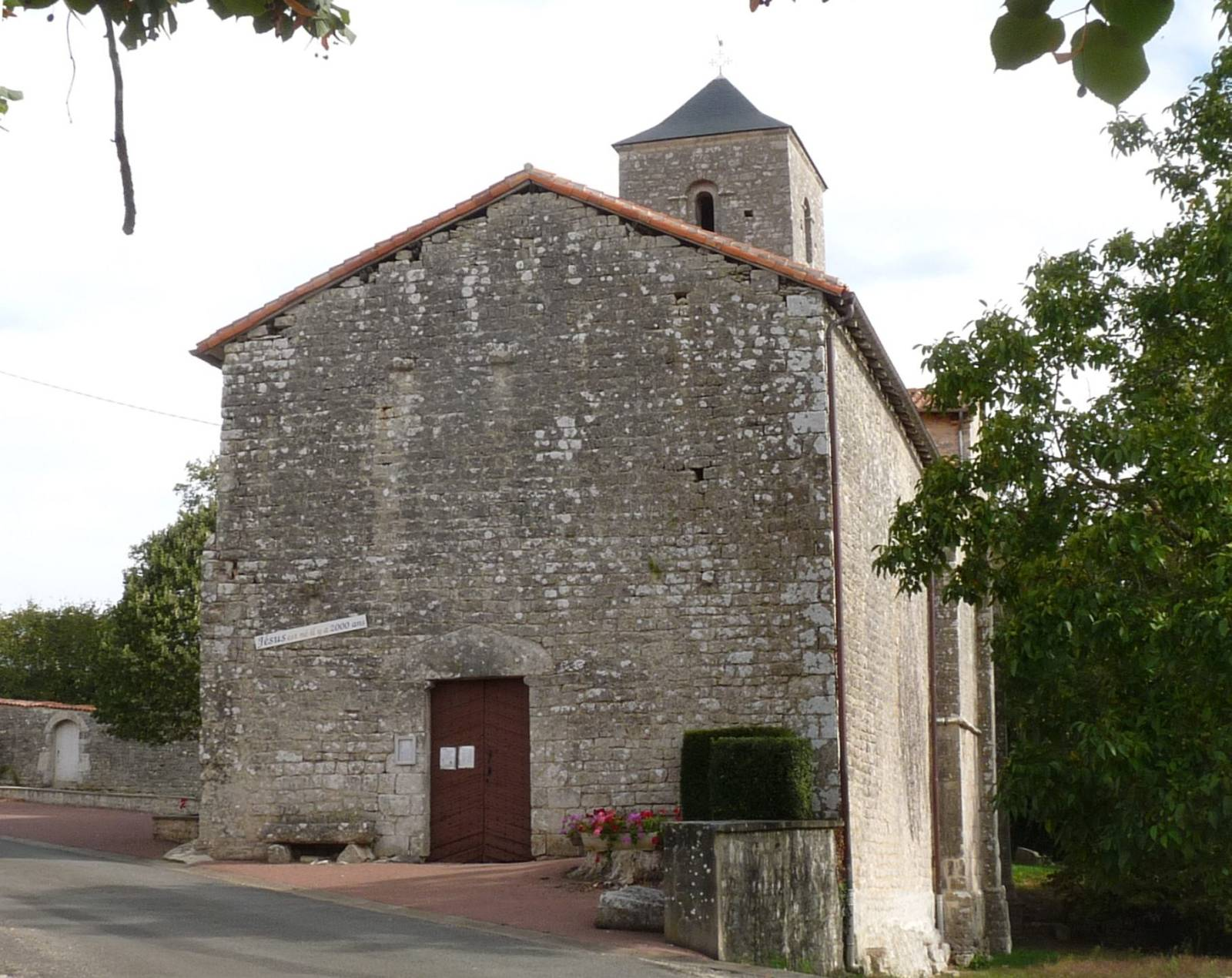 église de St-Georges, Charente, France